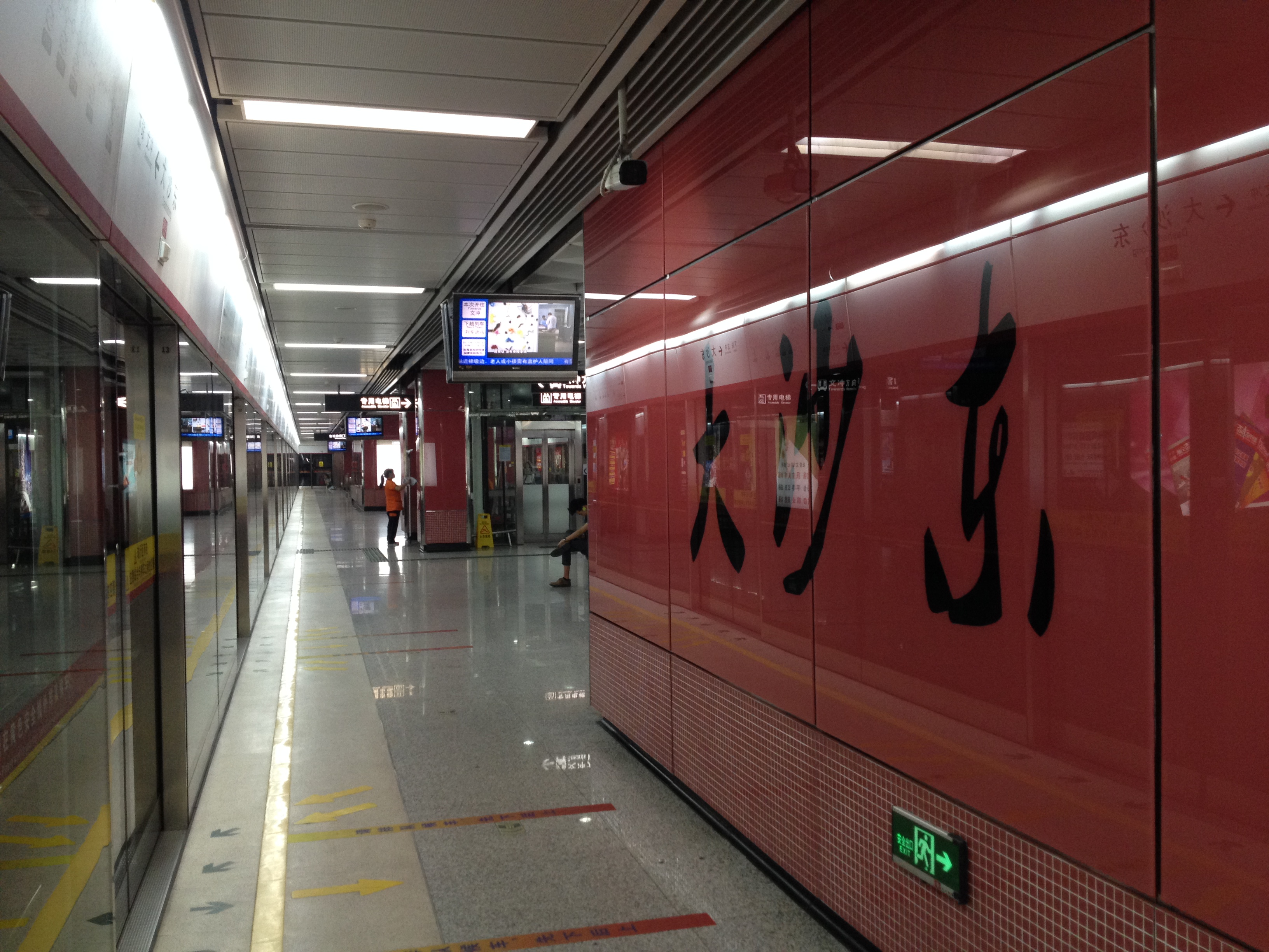 广州地铁大沙东站月台（文冲方向）